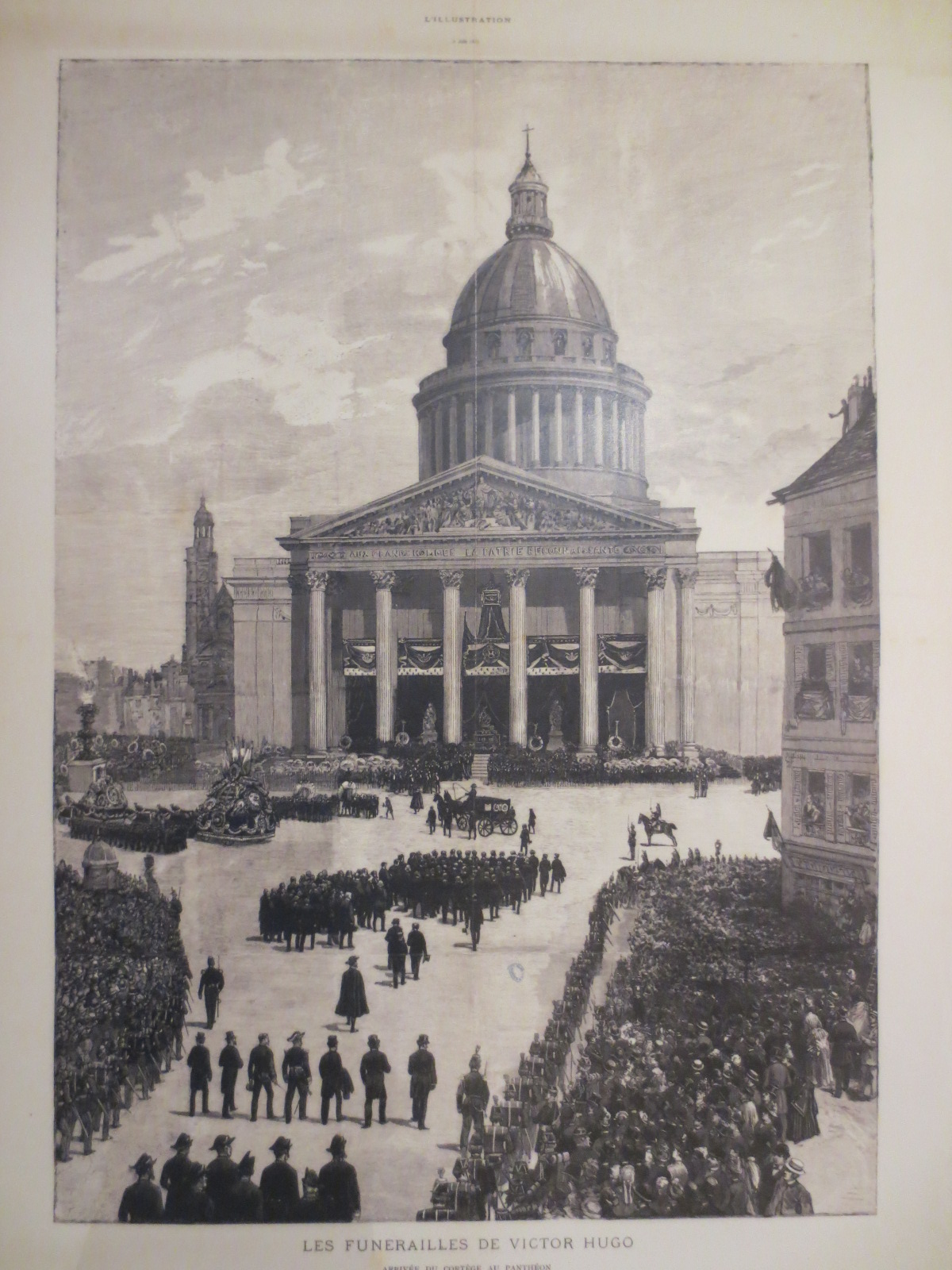 Maison natale de Victor Hugo : gravure de la revue L'Illustration du 6 juin 1885, des obsèques nationales de Victor Hugo en 1885 au Panthéon de Paris, devant une foule immense.